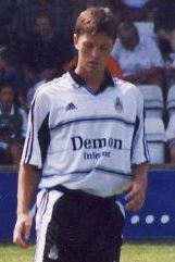 Stephen Hughes